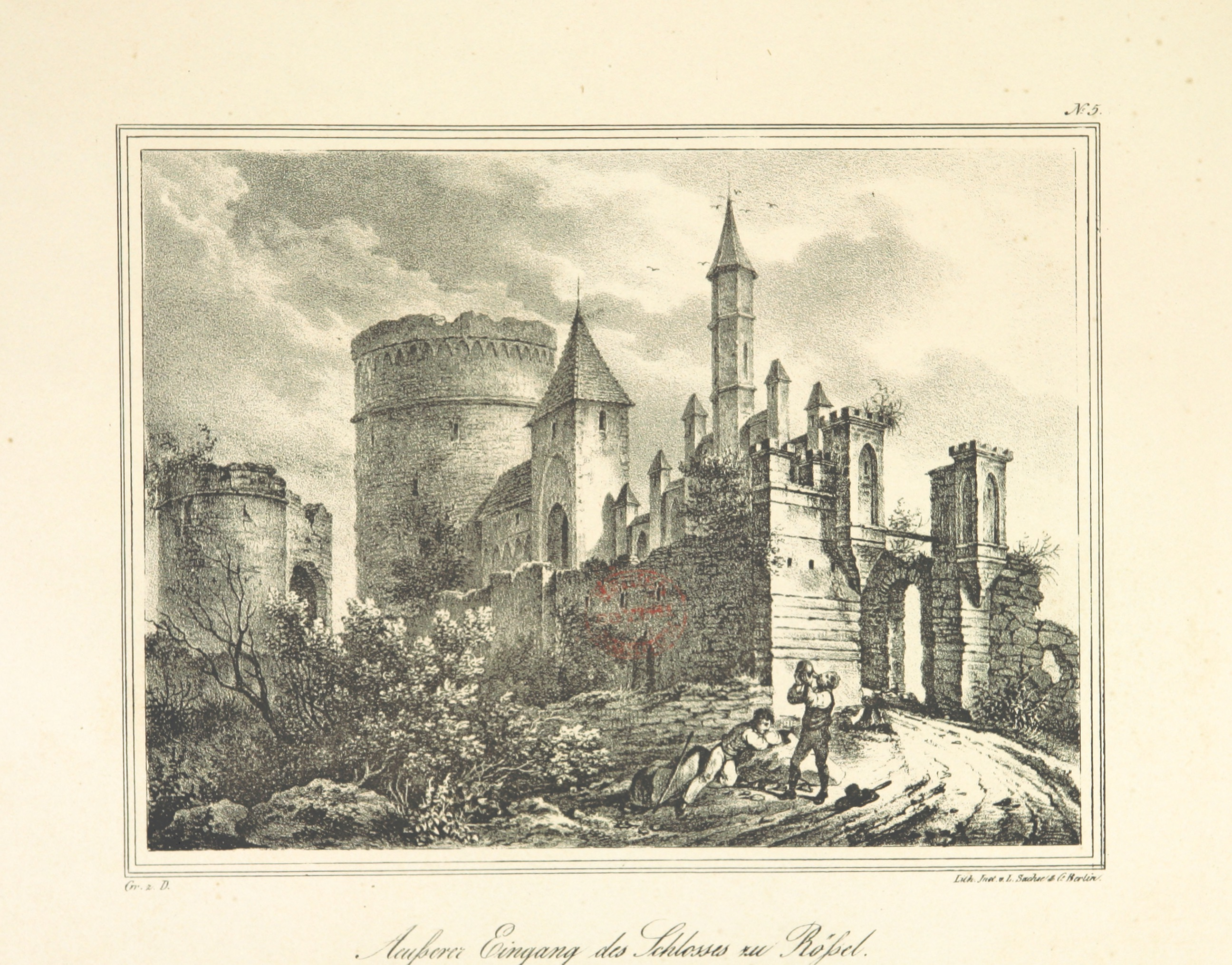 Zamek biskupi w Reszlu